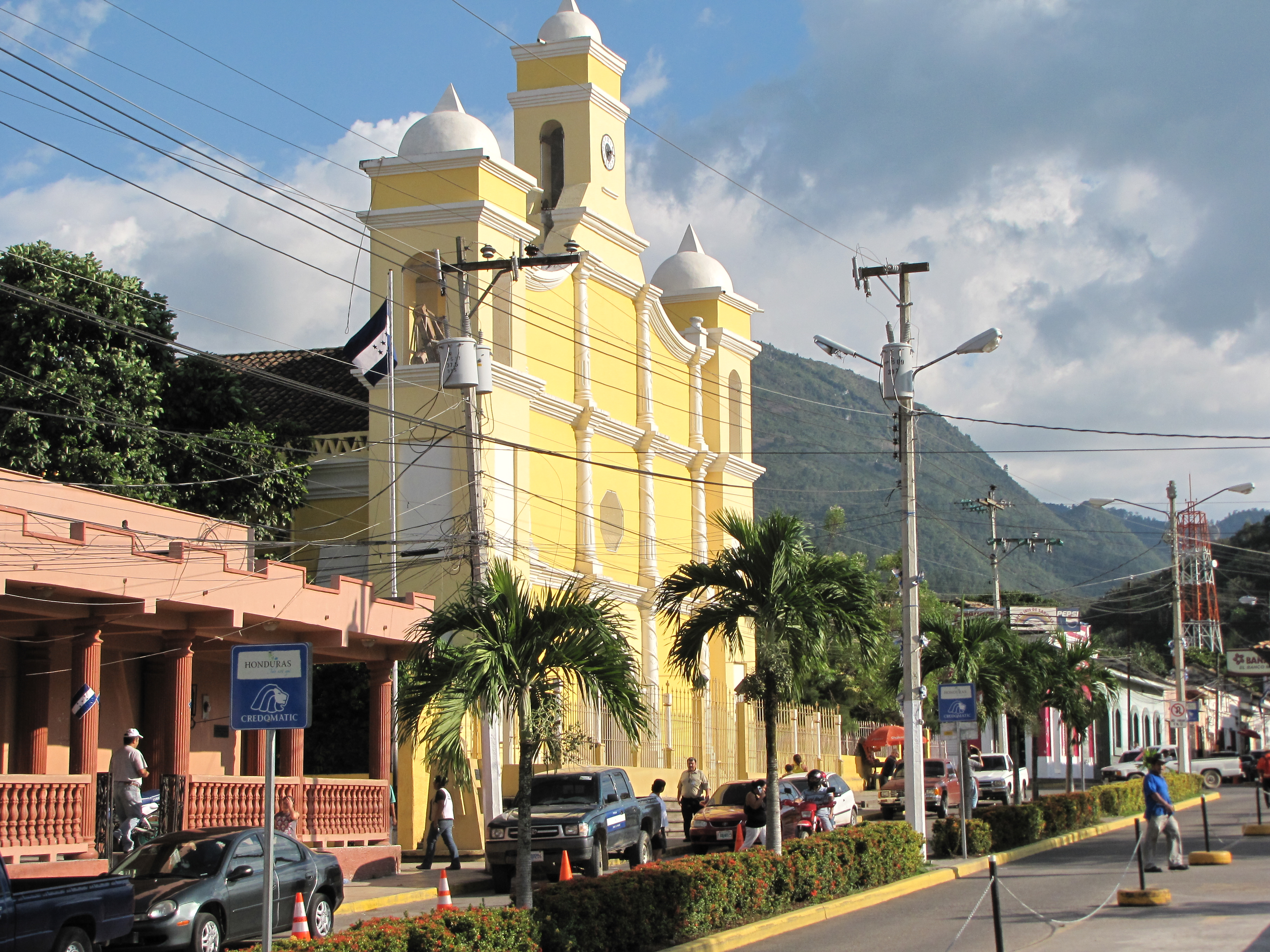 Templo catolico de la ciudad de Santa Barbara.